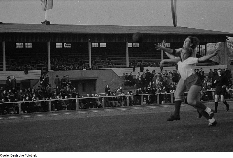 Original image description from the Deutsche Fotothek Handballspielerinnen bei einem Spiel auf dem Feld, im Hintergrund die Zuschauertribüne